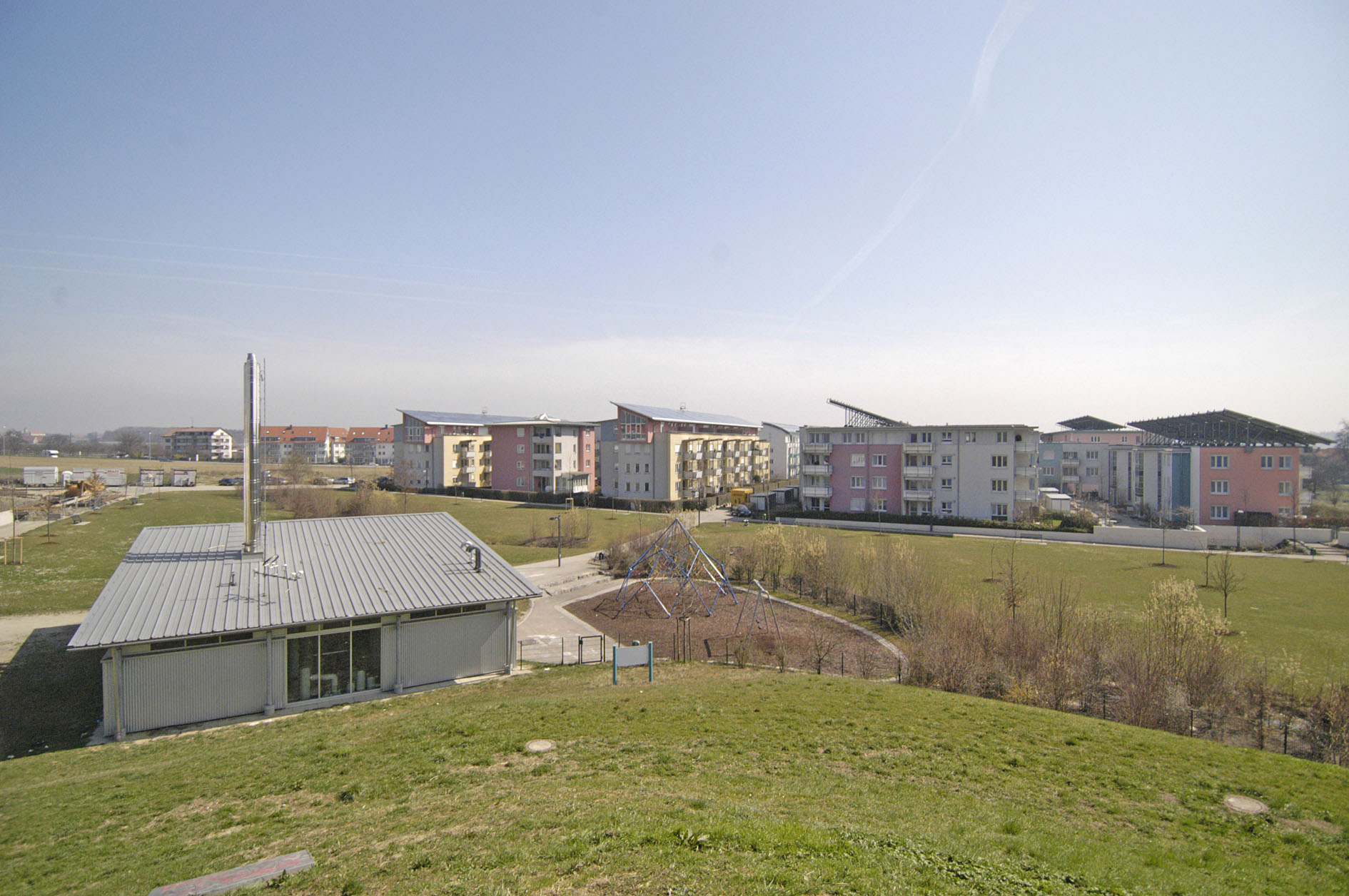 Solarstadt Friedrichshafen-Wiggenhausen